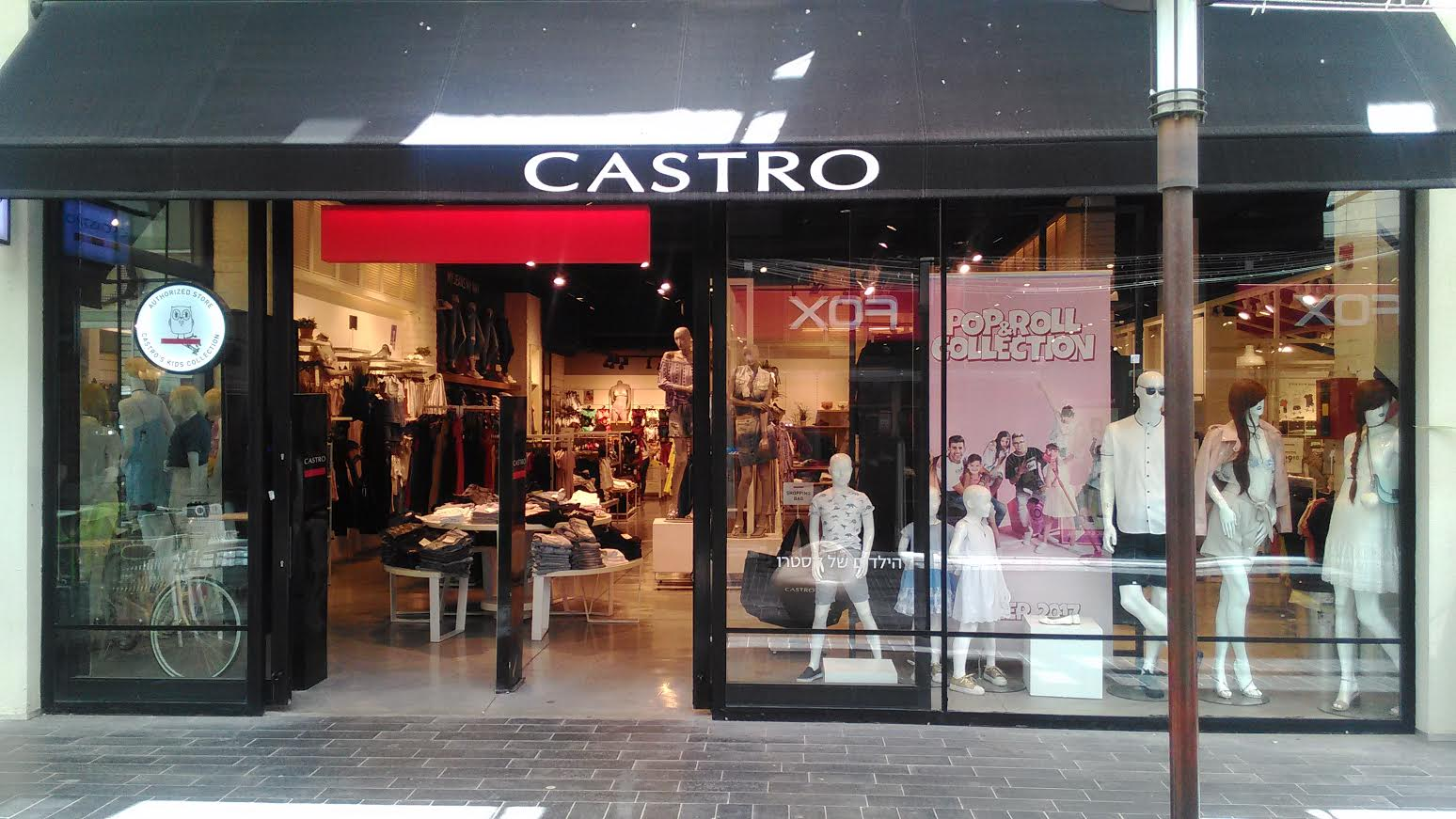 סניף הרשת